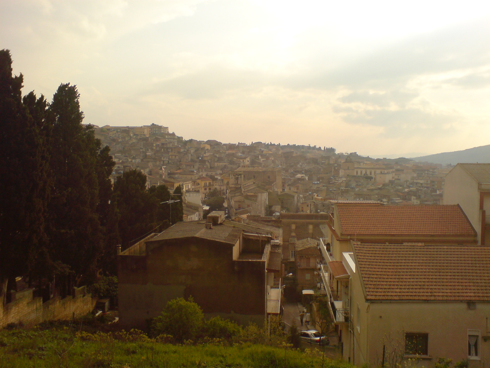 Vista del paese di Grotte (AG)